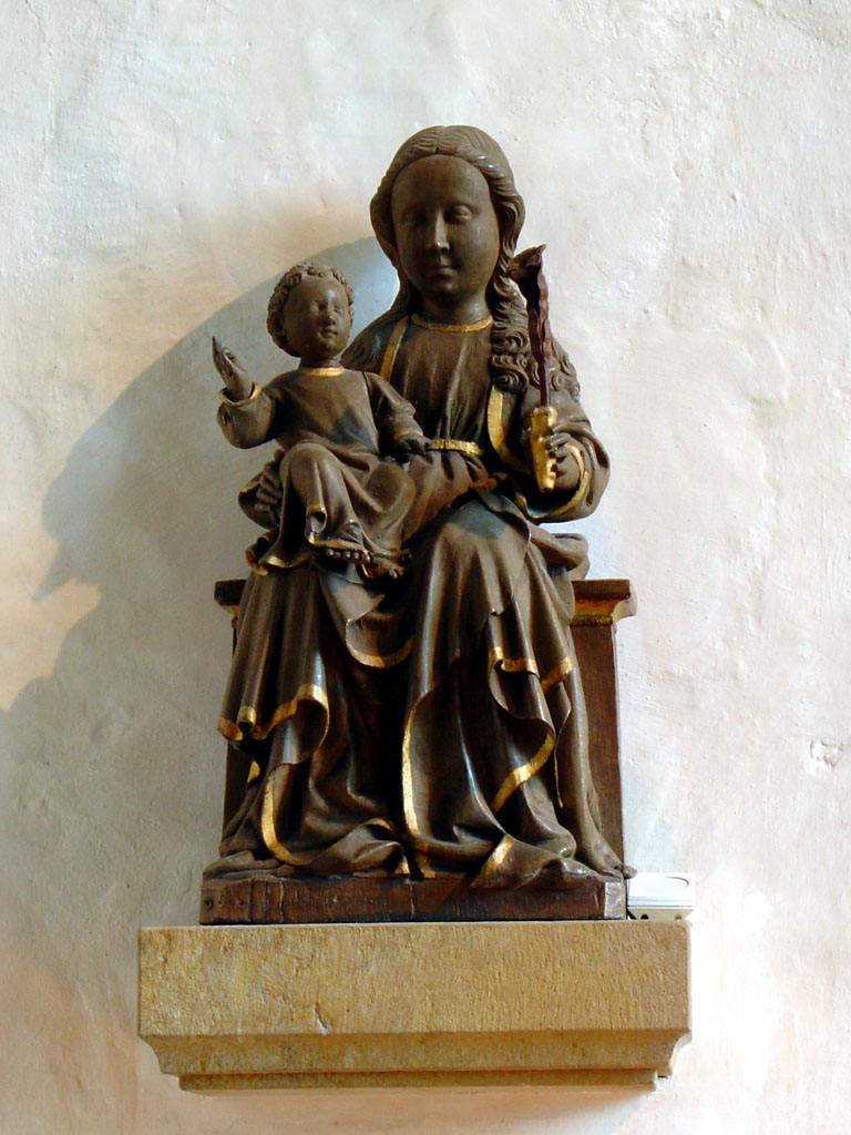 hölzerne Altarfigur aus dem Marienfelder Altar von 1457